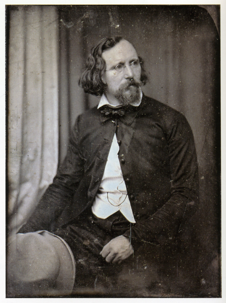 Eine Daguerreotypie des Heinrich Jakob Venedey aus dem Jahr 1848 von Hermann Biow in Frankfurt gefertigt. Größe von 20,8 x 15,4 cm. Venedey (1805-1871) war 1848/49 als Abgeordneter für Hessen-Homburg Mitglied der Deutschen Nationalversammlung in der Frankfurterter Paulskirche. Der Jurist gehörte zu den Fraktionen Deutscher Hof und Westendhall der Nationalversammlung.